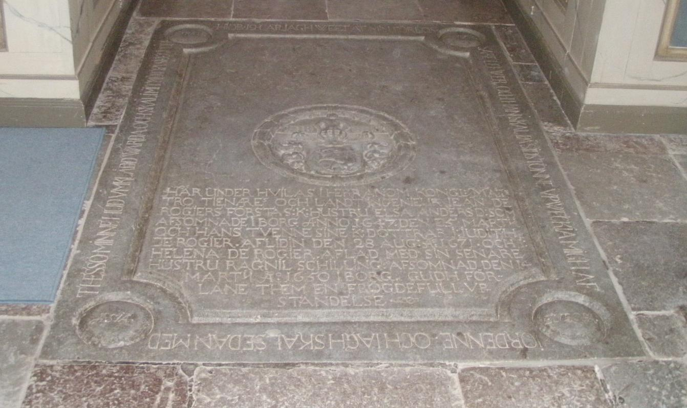 Lantmätare Jean de Rogiers (1600-1684), med hustru Ragnhild Schillings, gravsten i mittgången i långhuset. En av Östergötlands flitigaste lantmätare, med fransk bakgrund och verksam till 77 års ålder, bosatt och död på Fransberg i Tingstads socken 1684. Gravstenen var märklig för sin samtid, istället för kerubhuvuden eller evangelistsymboler i rundlarna i gravstenens hörn finns de under 1600-talet kända fyra världsdelarna, dvs Europa, Asien, Afrika och Amerika.